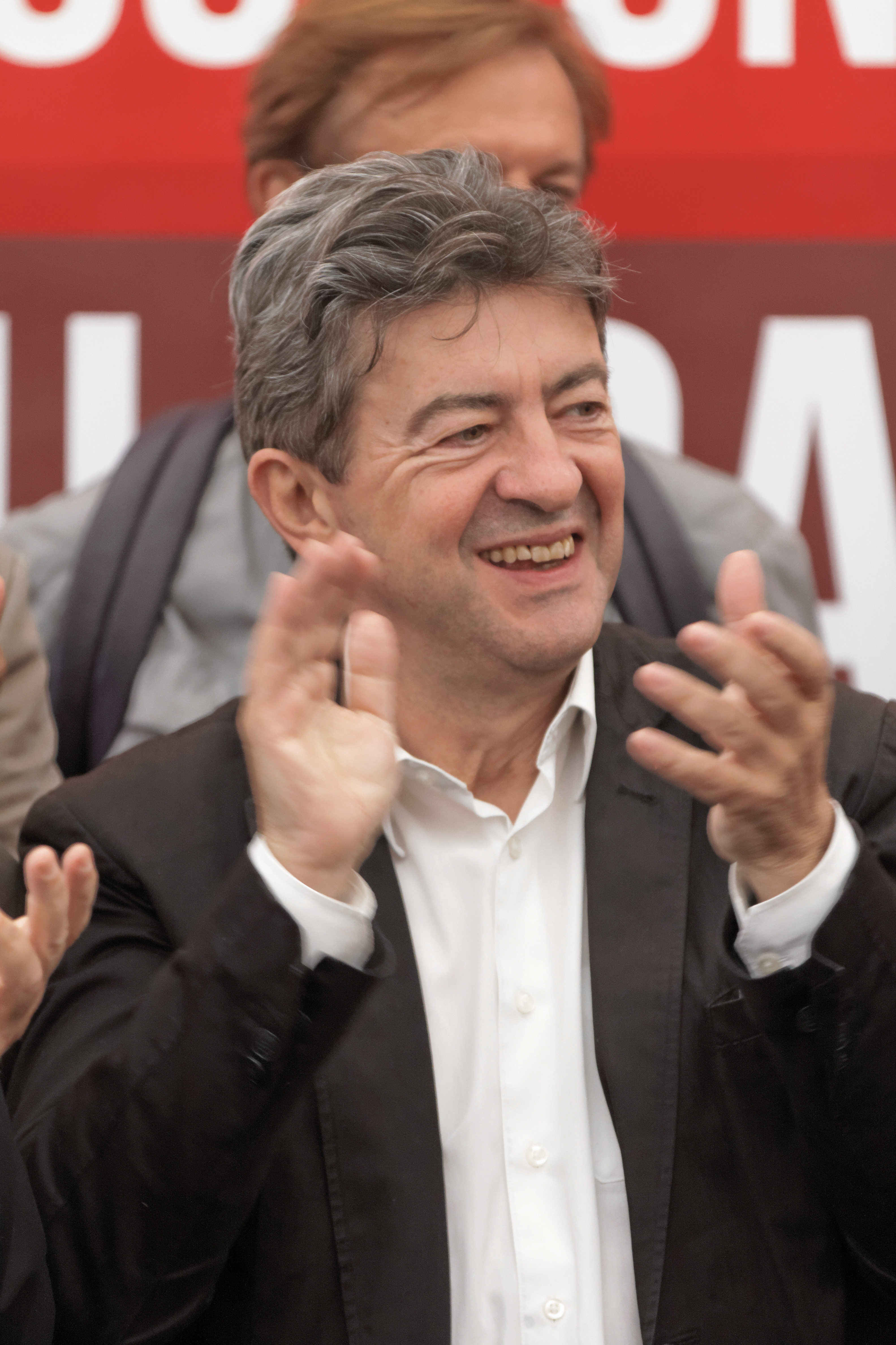 Jean-Luc Mélenchon au stand du Front de Gauche lors de la fête de l'Humanité 2012.